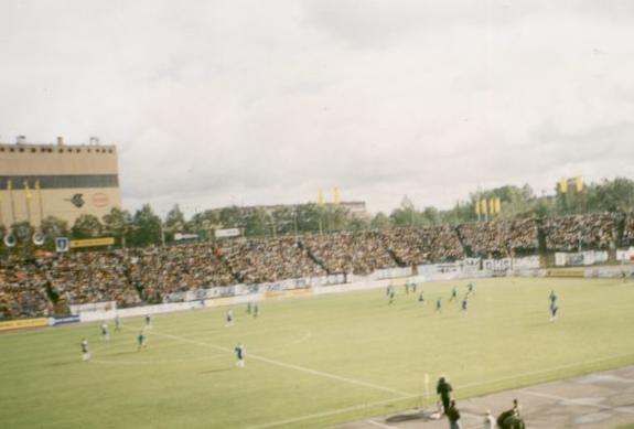 Zdjęcie pochodzi ze spotkania rozegranego w 1995 roku w Olsztynie, pomiędzy Stomilem a Legią Warszawa. Wykonane zostało z trybuny krytej stadionu.